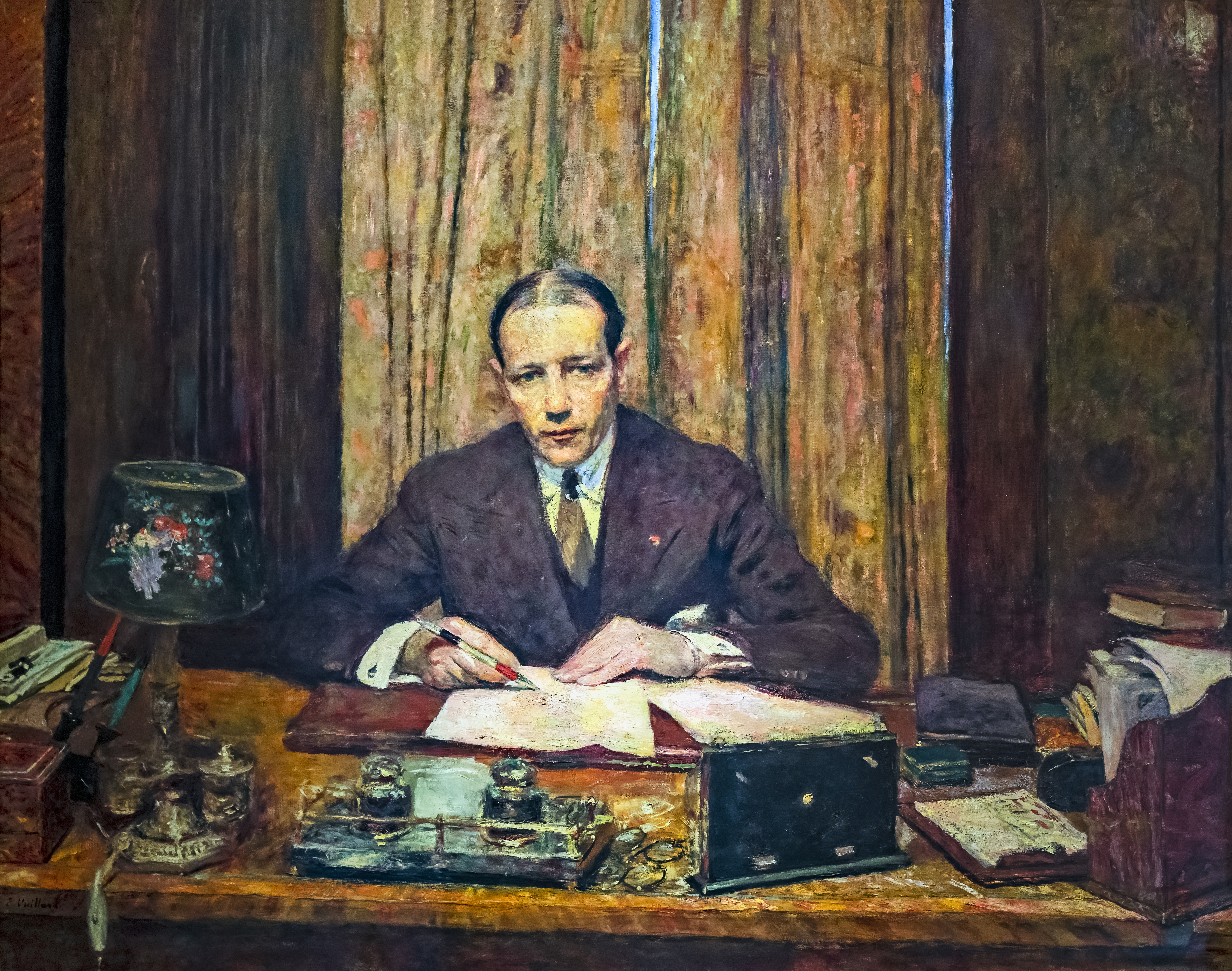 Depicted person: Lucien Rosengart – French engineer